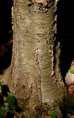 Betula alleghaniensis, River Birch. Betula alleghaniensis